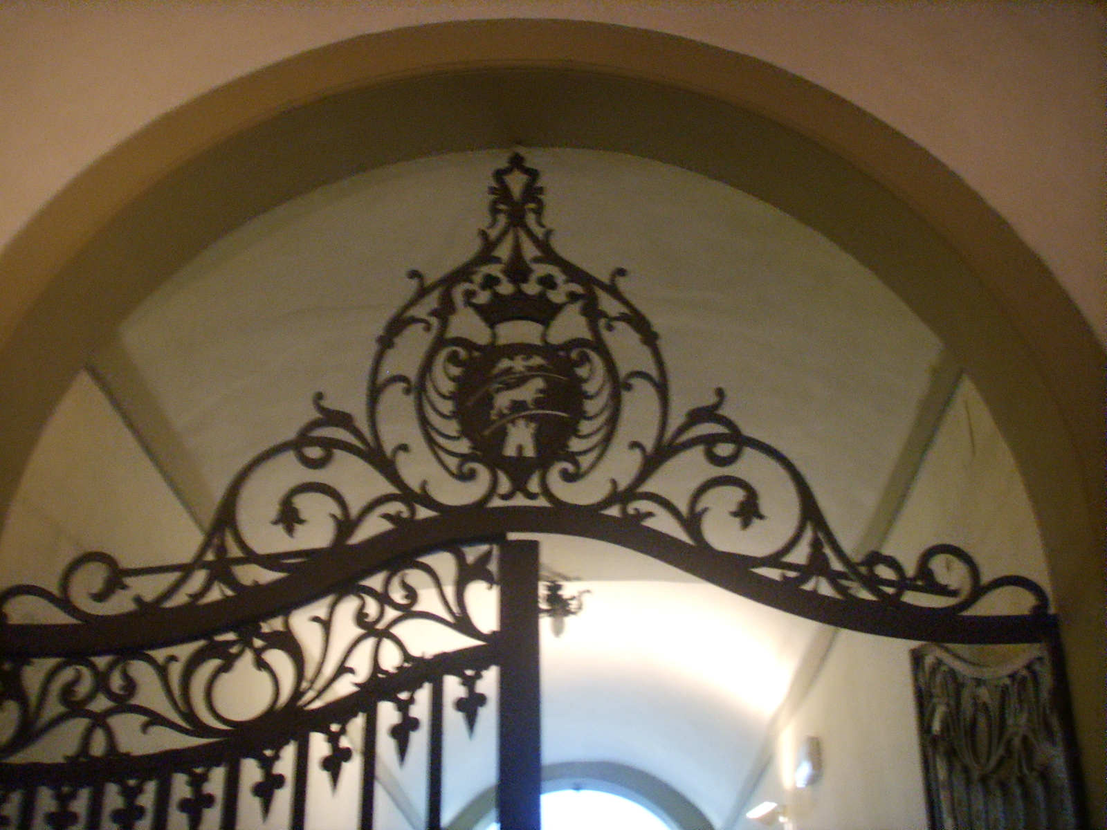 Palazzo_Ramirez_da_Montalvo in Florence, Italy